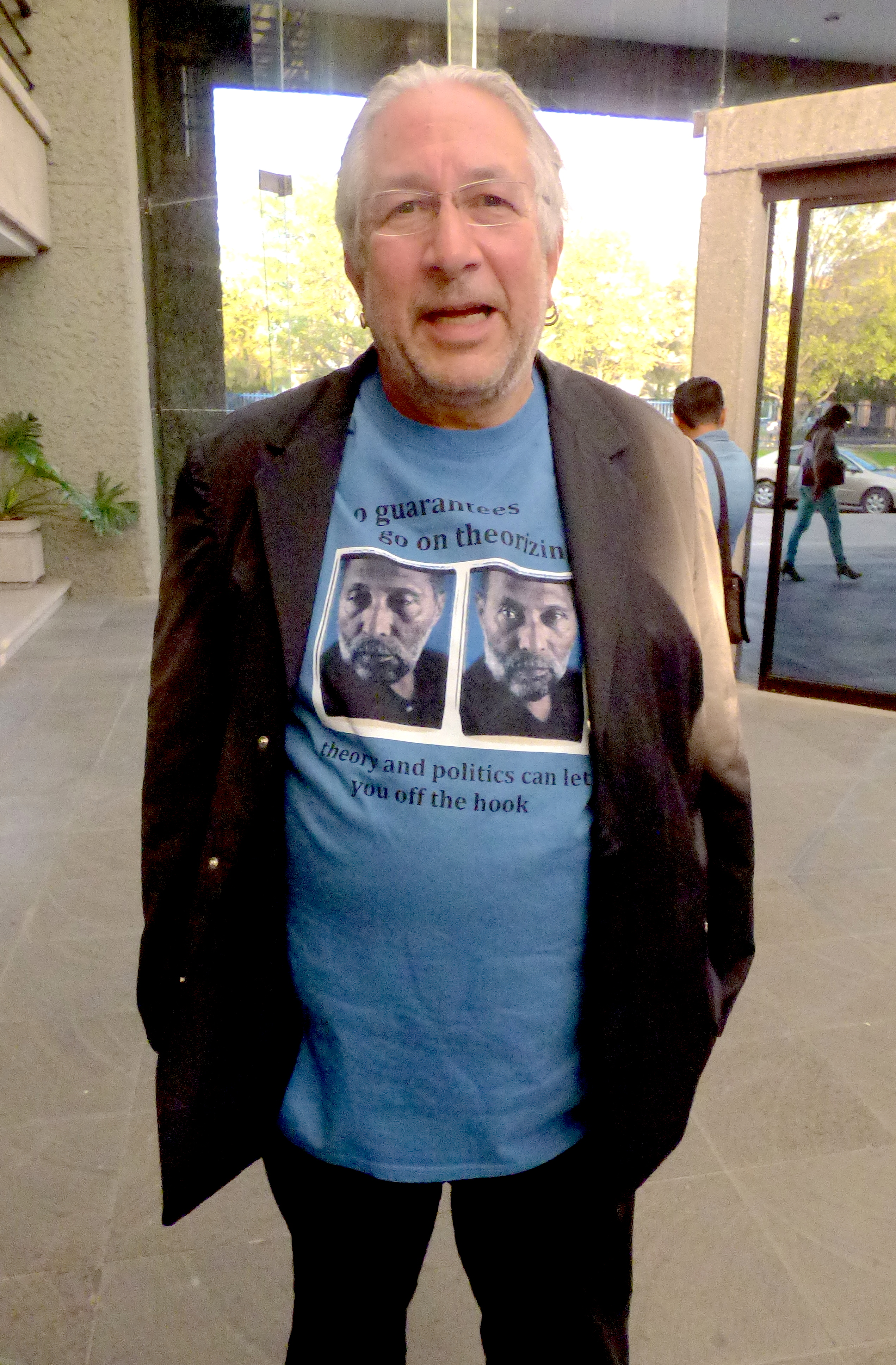 Lawrence Grossberg en la Universidad Autónoma de Aguascalientes, durante el I Congreso Cultura en América Latina en Memoria de Stuart Hall